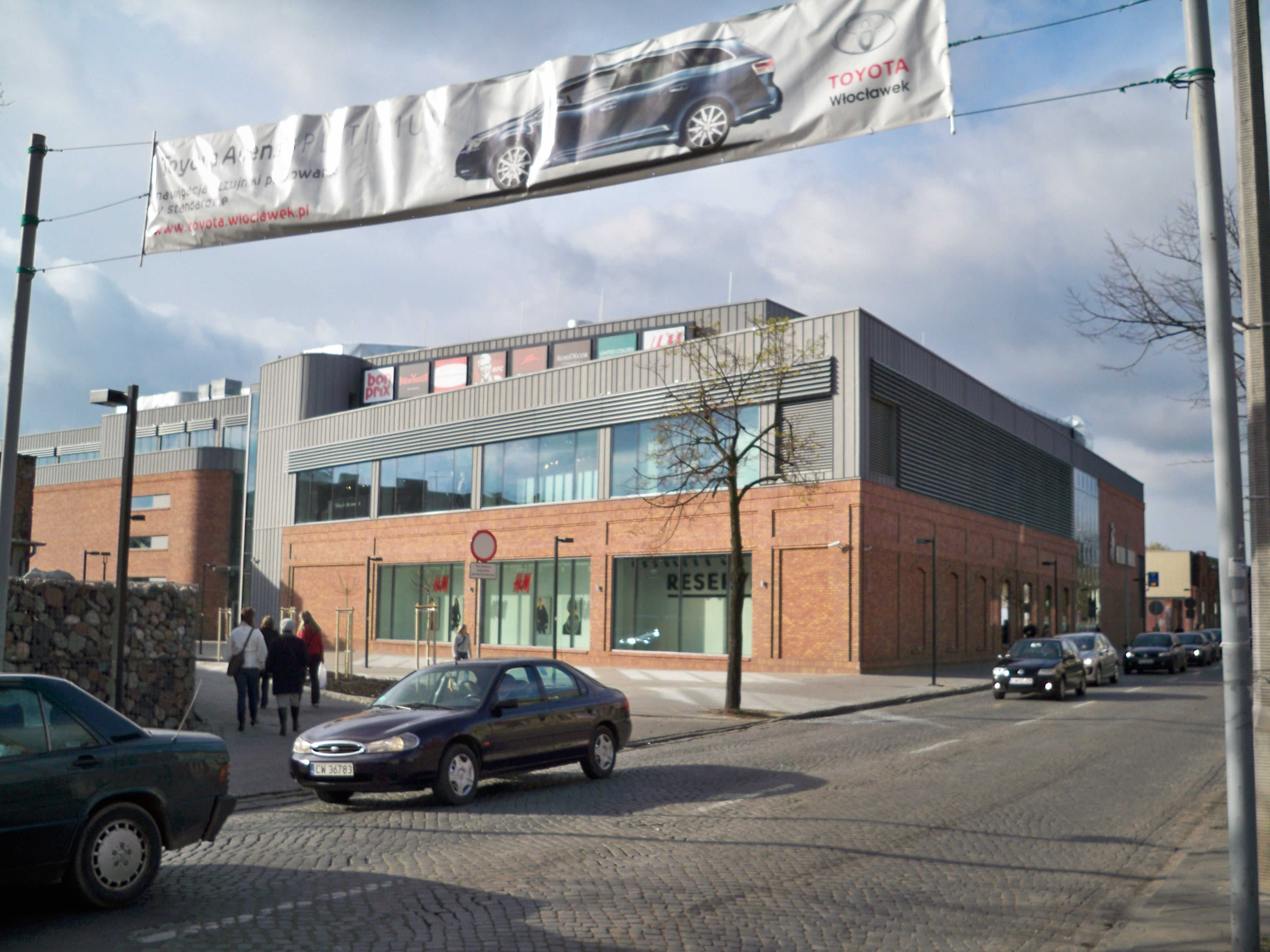 Wzorcownia Włocławek w 2009 r.